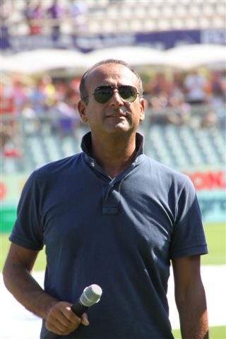 Il presentatore italiano in uno scatto recente.